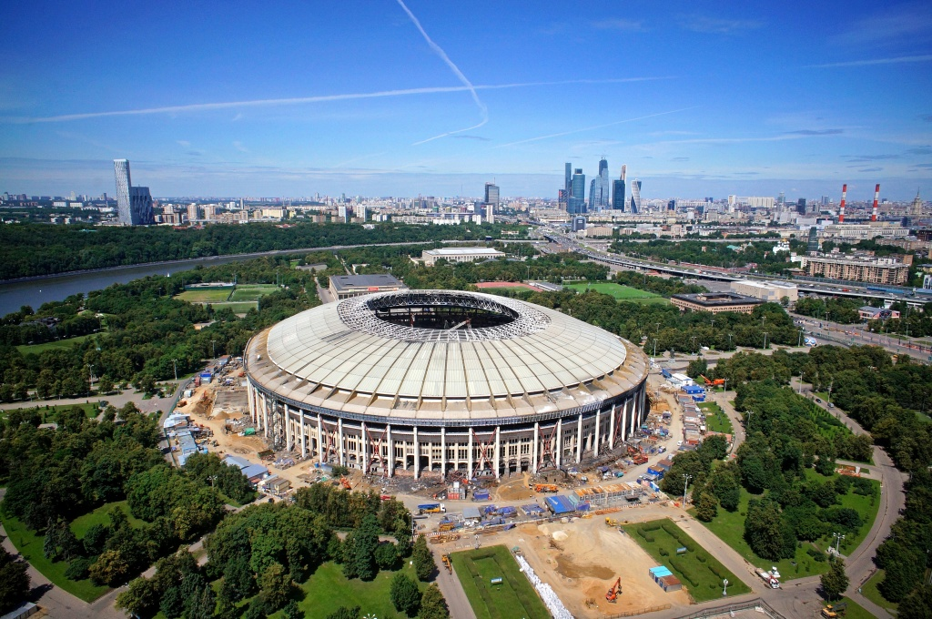 Реконструкция стадиона Лужники (июль 2015 года).